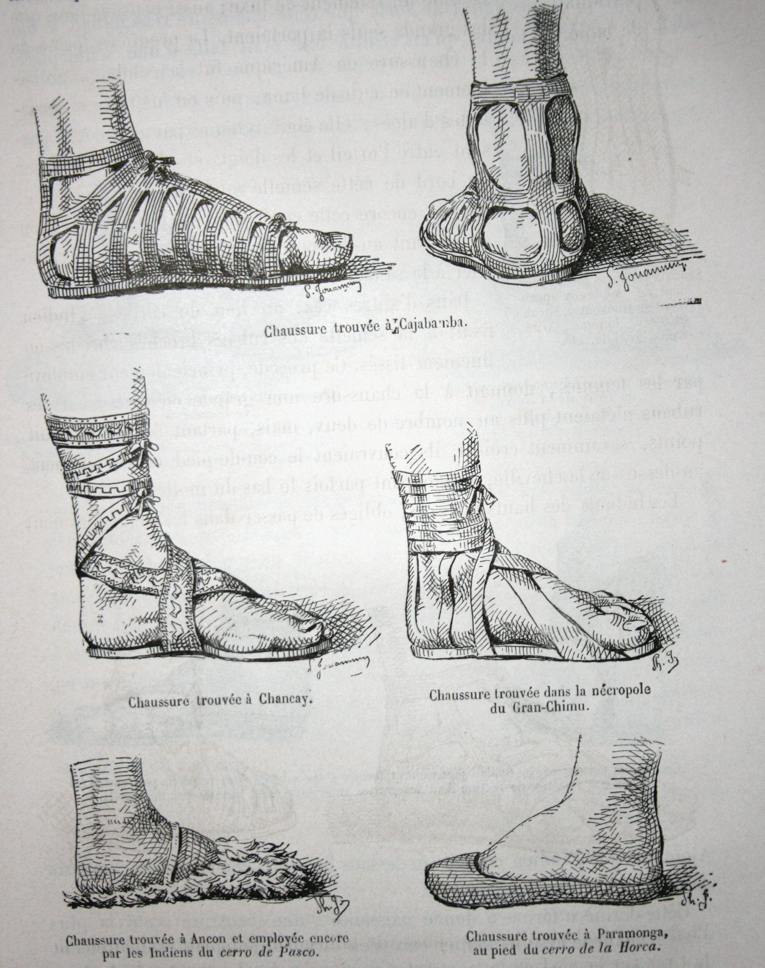 Dessin de Charles Wiener, p 679. Chaussures découvertes à Cajala, Chancay, Nécropole de Gran Chimu, Ancon et Paramonga; Bolivie/Pérou